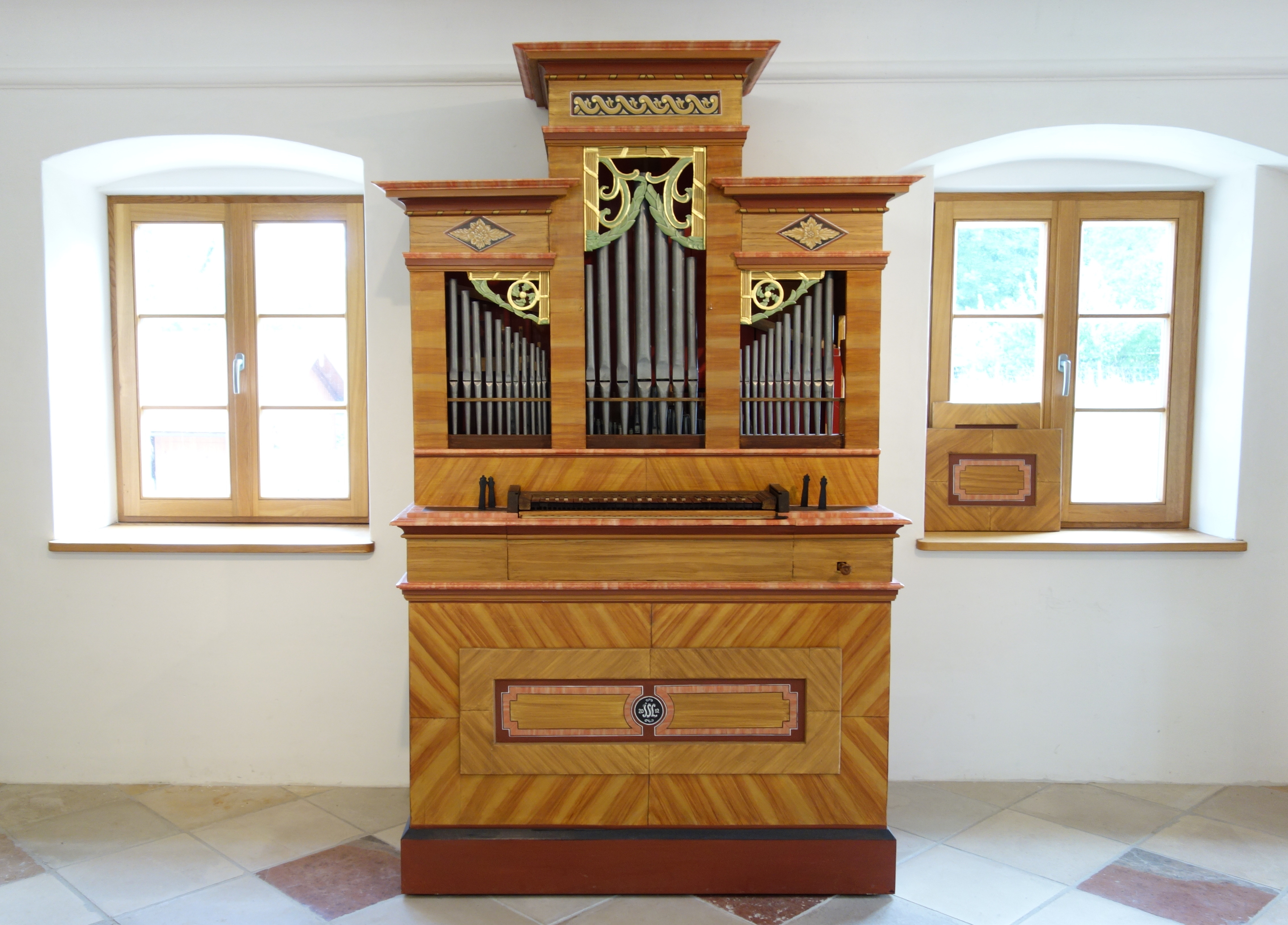 Orgelpositiv aus Walpersdorf im Orgelzentrum Valley (17./18. Jhd., I/5)